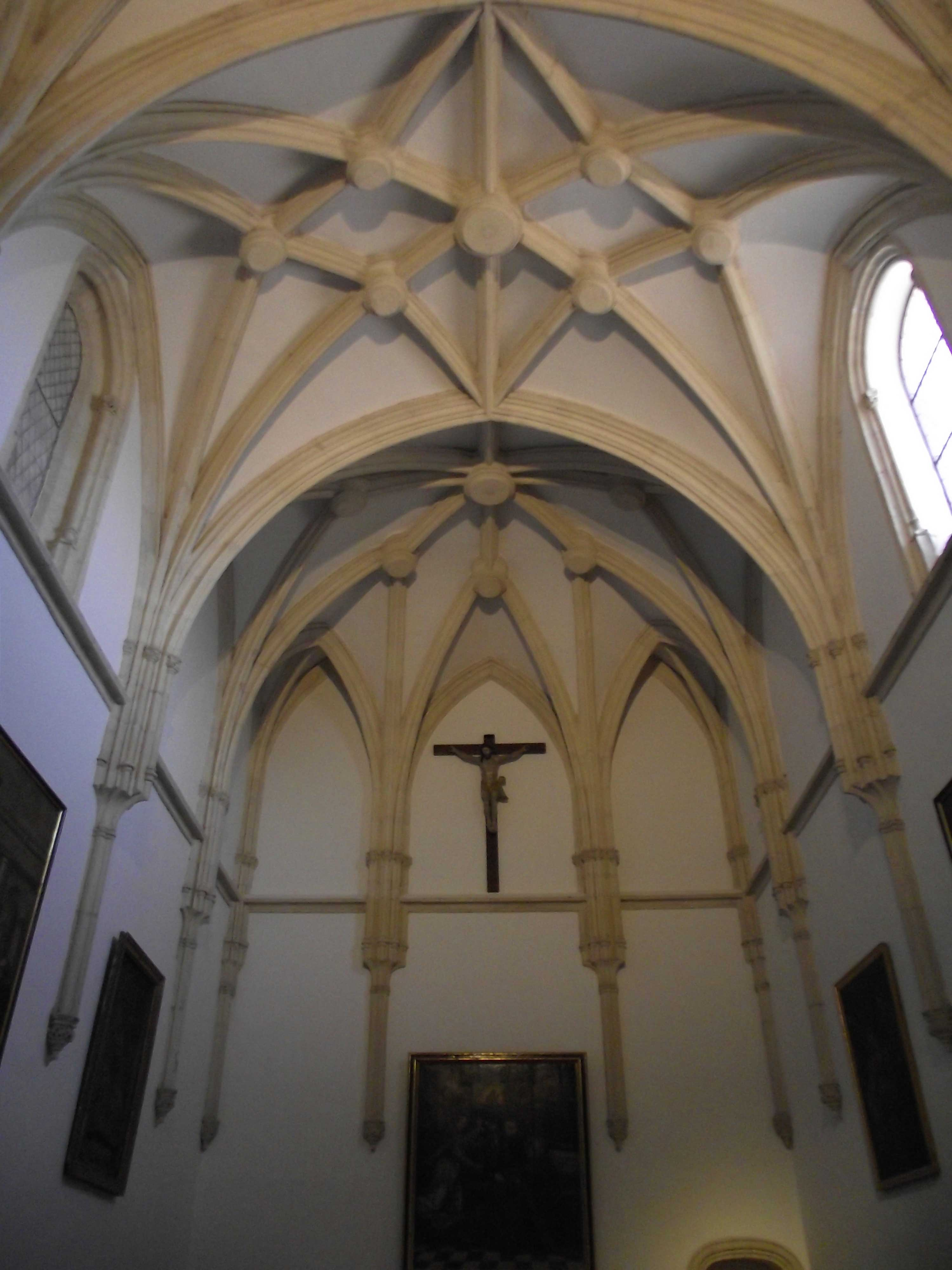 Cartuja de Granada, Sala Capitular